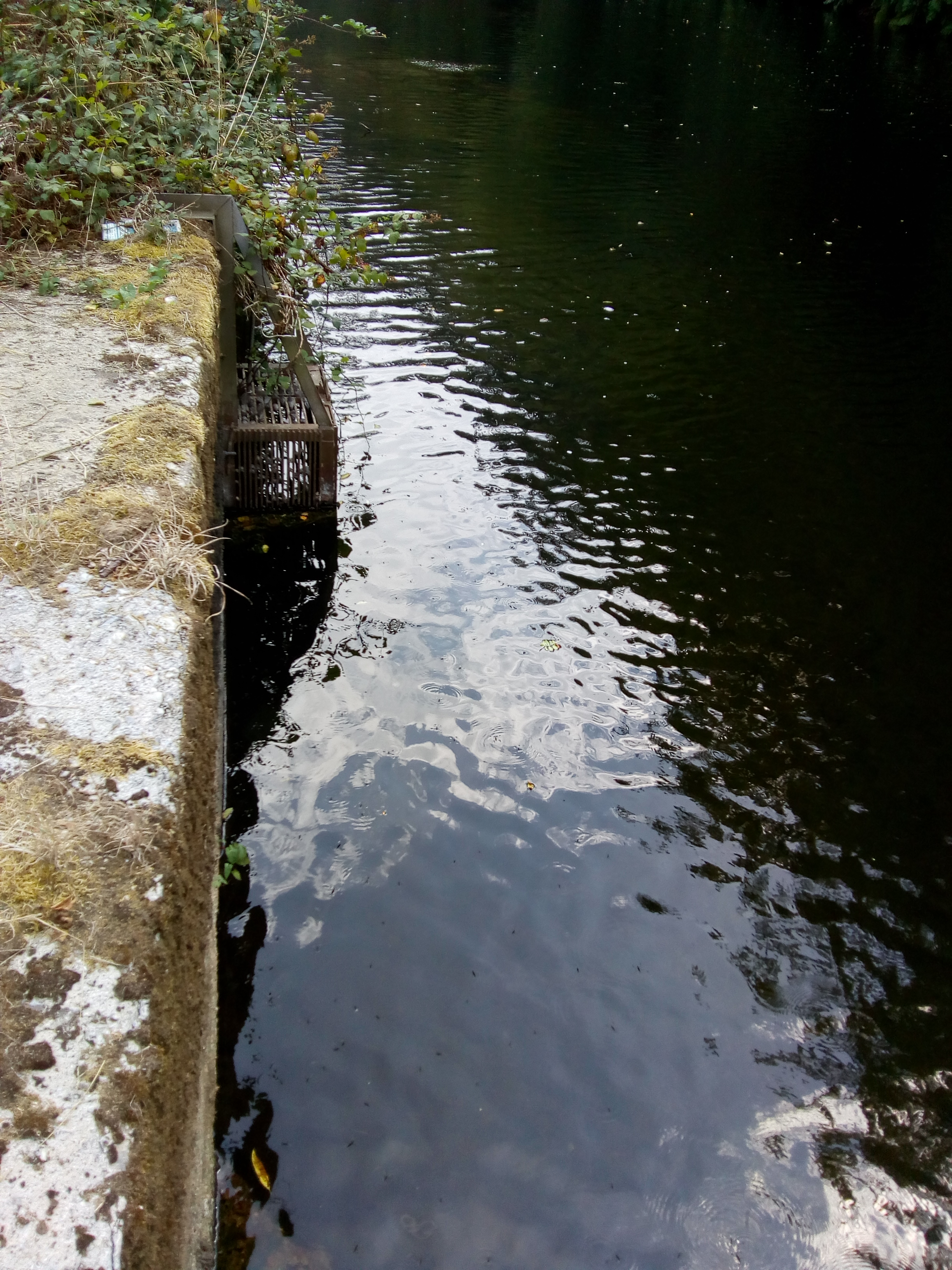 Captación de auga para o consumo de Ribadeo e Trabada no río Eo